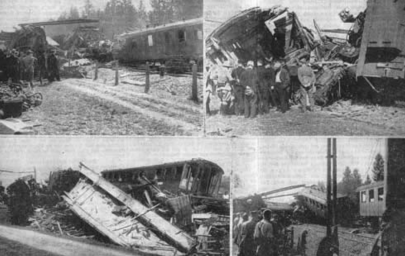 Am 23. September 1941 stieß zwischen Wichtrach und Kiesen ein Schnellzug mit hoher Geschwindigkeit mit einem Personenzug zusammen. Auf dem Unfallplatz bot sich ein Bild des Grauens.